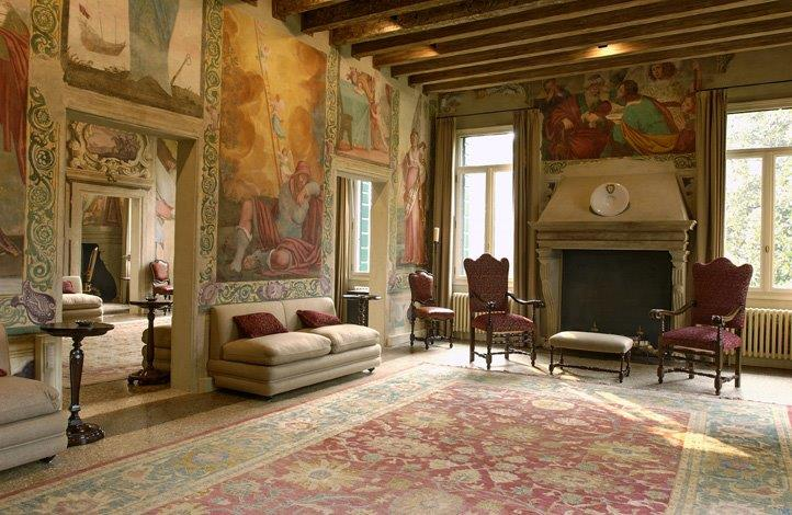 Sala affrescata piano nobile Villa Borromeo Padova